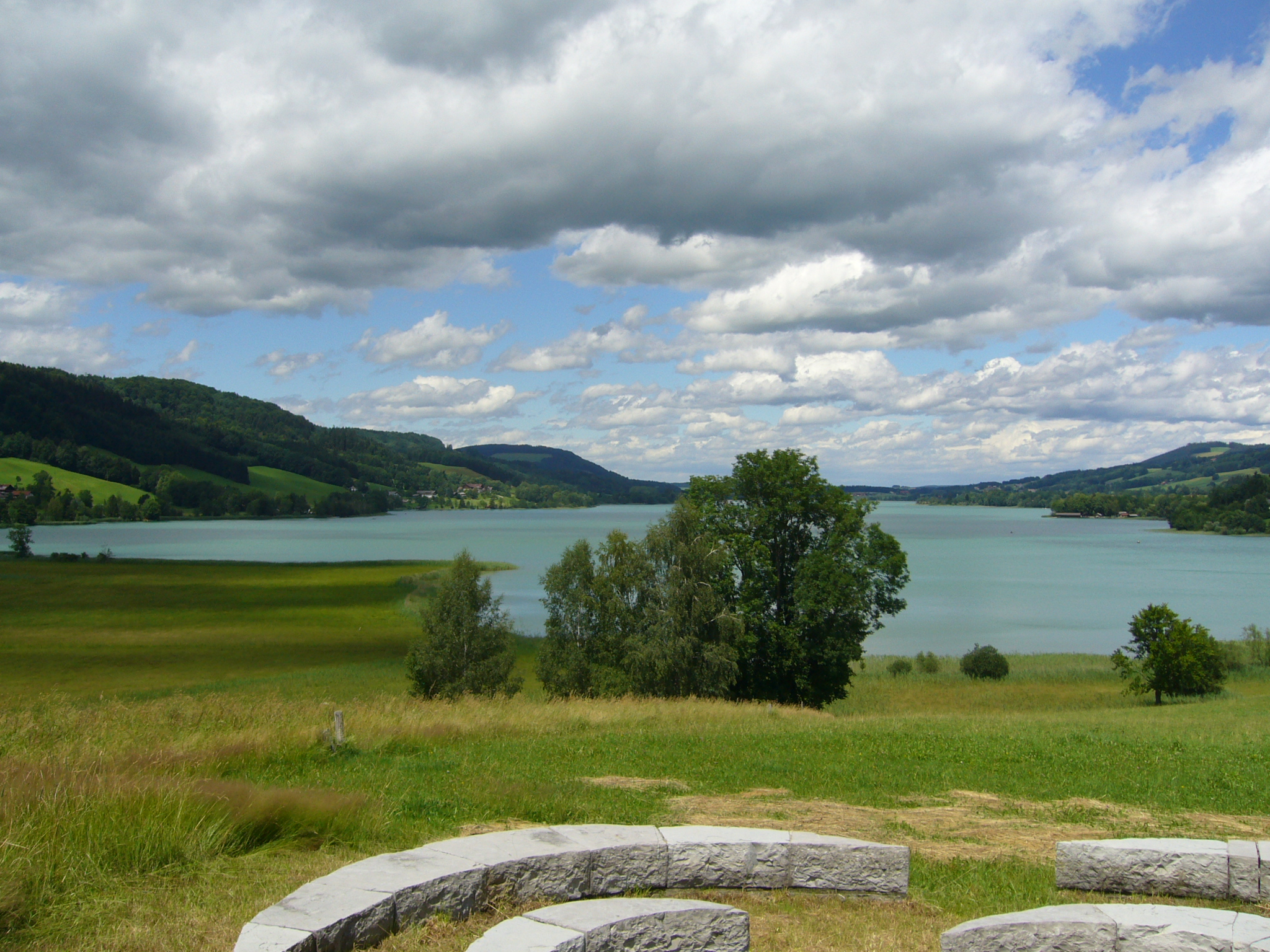 Der Irrsee in Oberösterreich von Süden aus